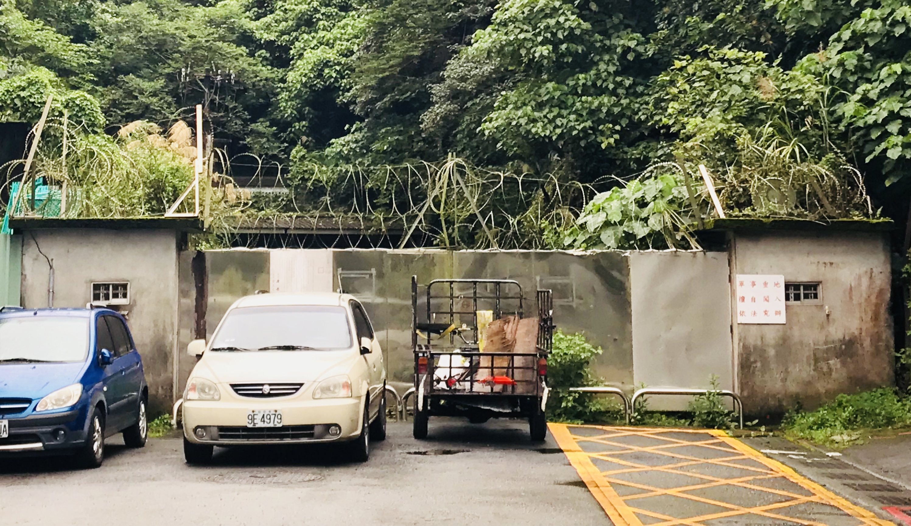 臺北市文山區福興隧道口，位於福興路路底